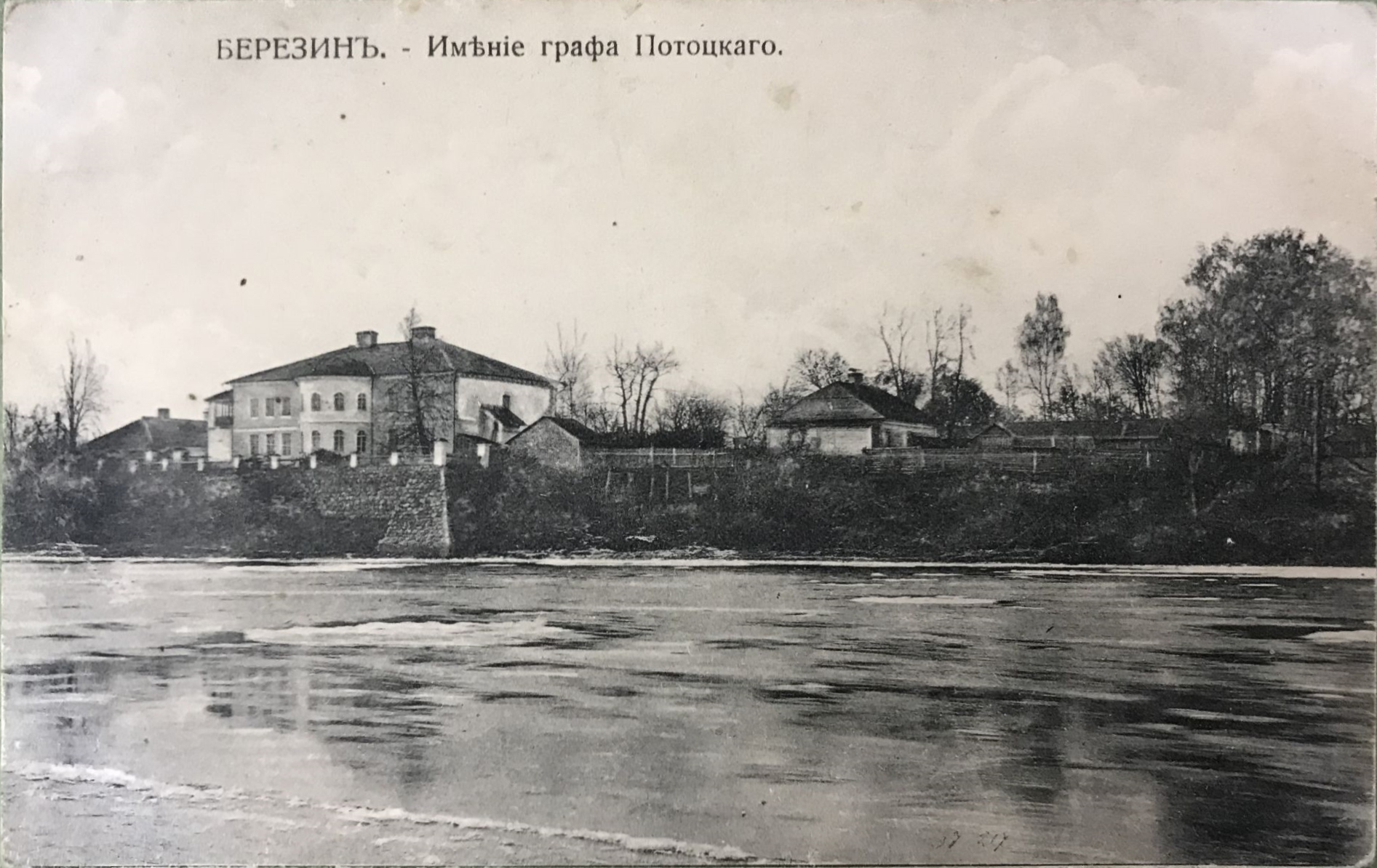 Беларуская (тарашкевіца): Бярэзань (Biarezań) з боку ракі Бярэзіны (Biarezina). Сядзіба Патоцкіх (Patocki)